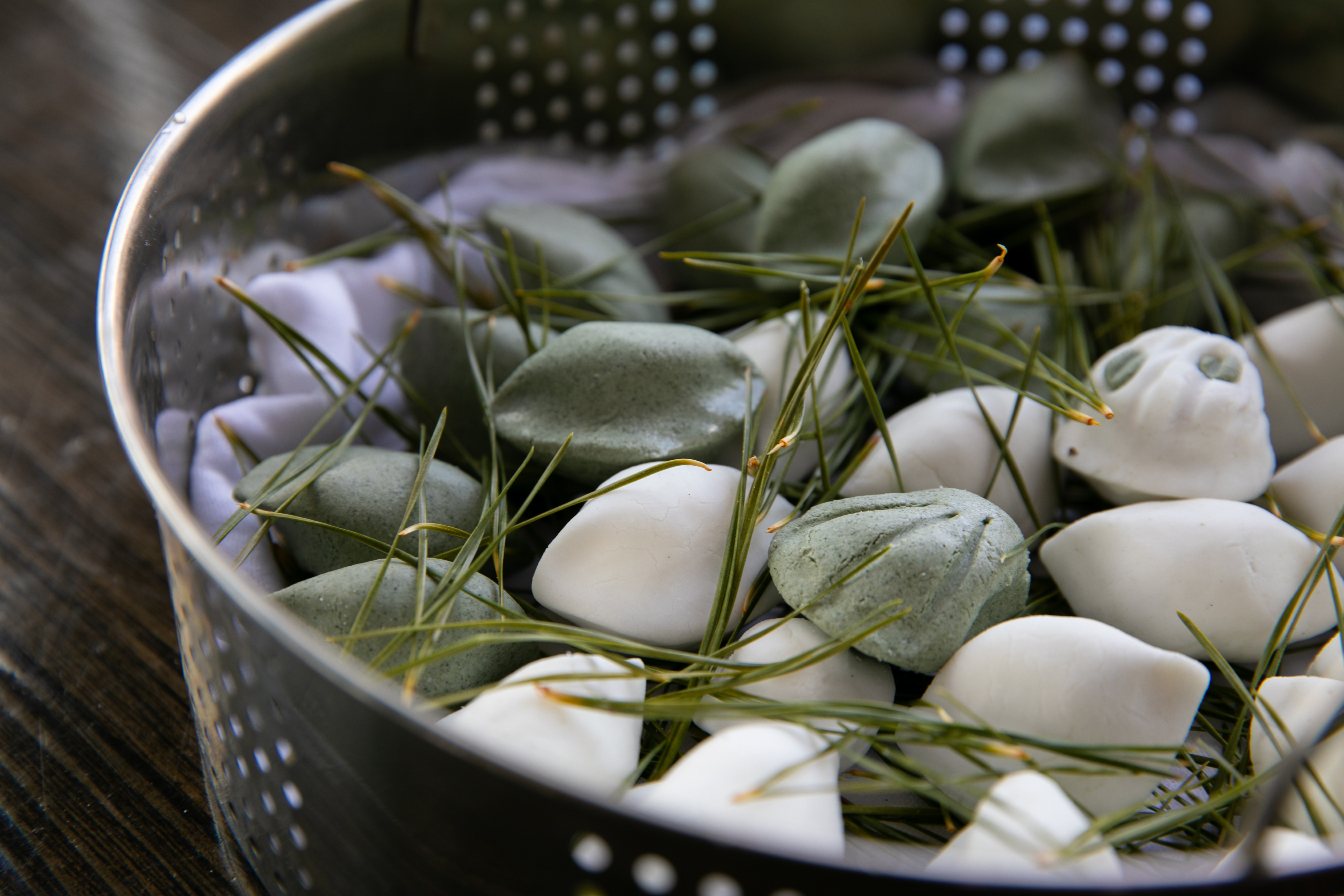 Chuseok Songpyeon September 12, 2018 Institute of Traditional Korean Food, Jongno-gu, Seoul Ministry of Culture, Sports and Tourism Korean Culture and Information Service ( Official Photographer : Kim Sunjoo This official Republic of Korea photograph is being made available only for publication by news organizations and/or for personal printing by the subject(s) of the photograph. The photograph may not be manipulated in any way. Also, it may not be used in any type of commercial, advertisement, product or promotion that in any way suggests approval or endorsement from the government of the Republic of Korea. 한국의 다양한 송편 2018-09-12 한국전통음식연구소 문화체육관광부 해외문화홍보원 코리아넷 김순주